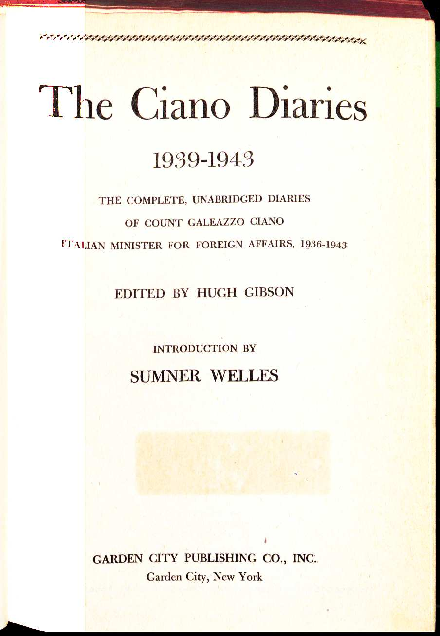 Hugh Gibson (ed.):: The Ciano Diaries 1939-1943: The Complete, Unabridged Diaries of Count Galeazzo Ciano, Italian Minister of Foreign Affairs, 1936-1943. Introduction Sumner Welles.. New York : Garden City, 1947 (repr.)